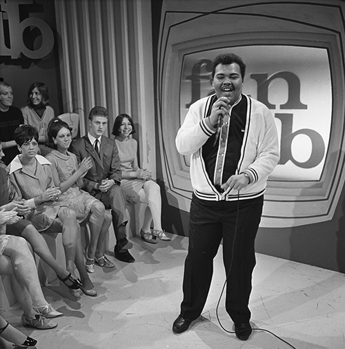 Big John Russell in het televisieprogramma Fanclub